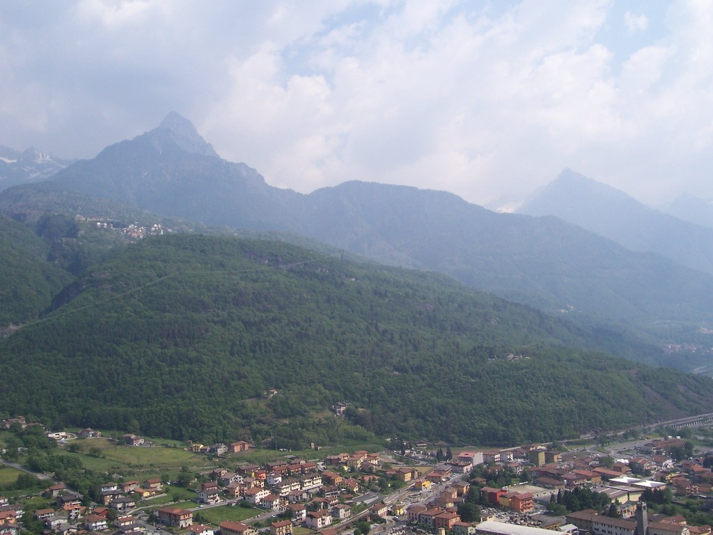 Naquane, Capo di Ponte, Italia